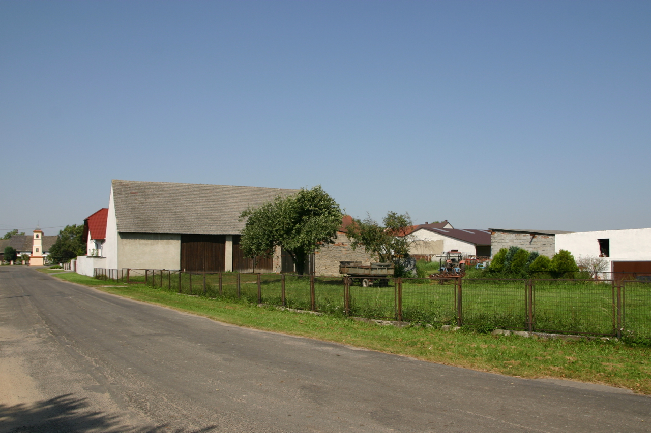 Zabierzów (dodatkowa nazwa w j. niem. Zabierzau) – wieś w Polsce położona w województwie opolskim, w powiecie krapkowickim, w gminie Walce.